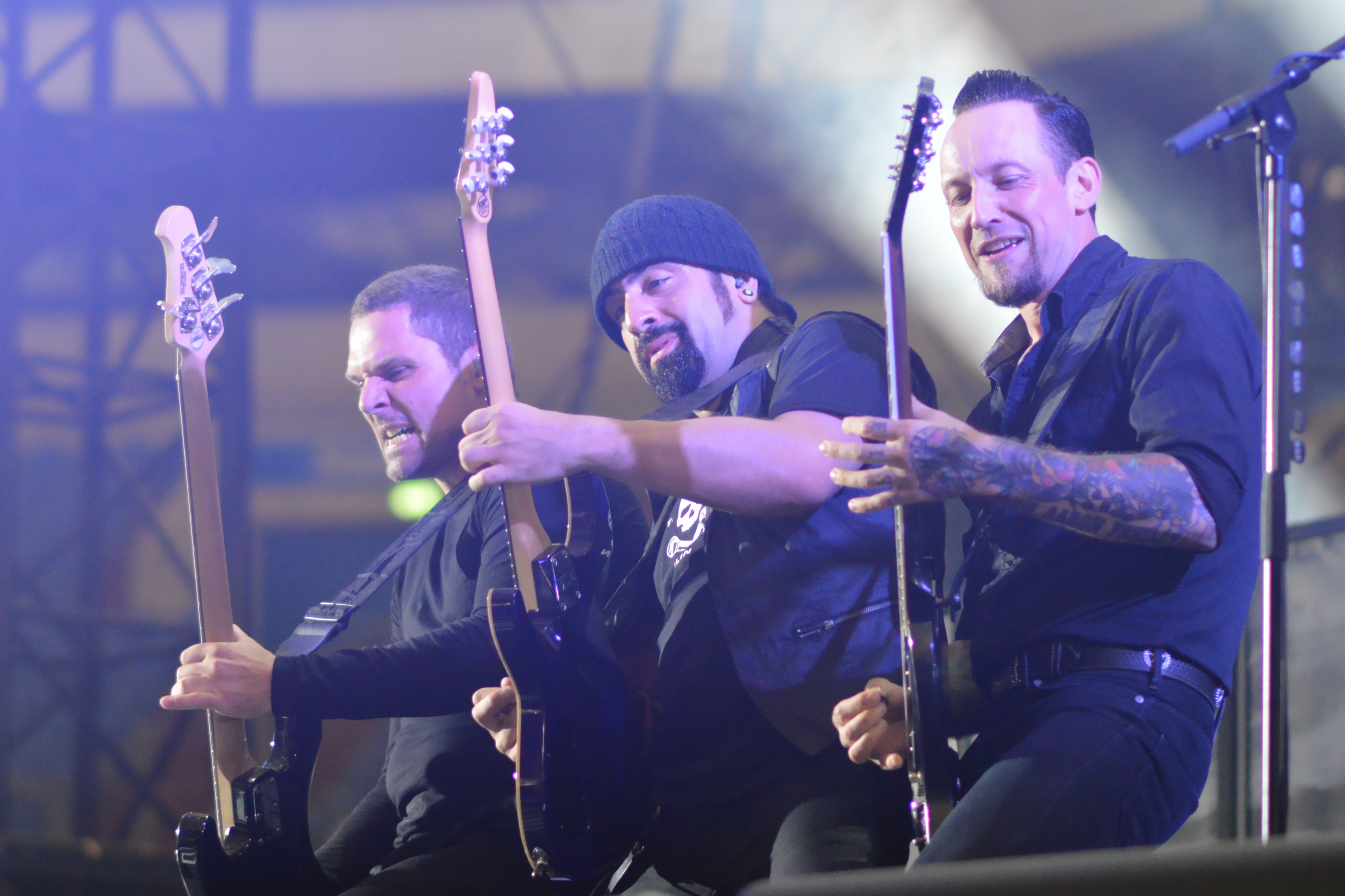 Volbeat bei Rock im Pott 2013